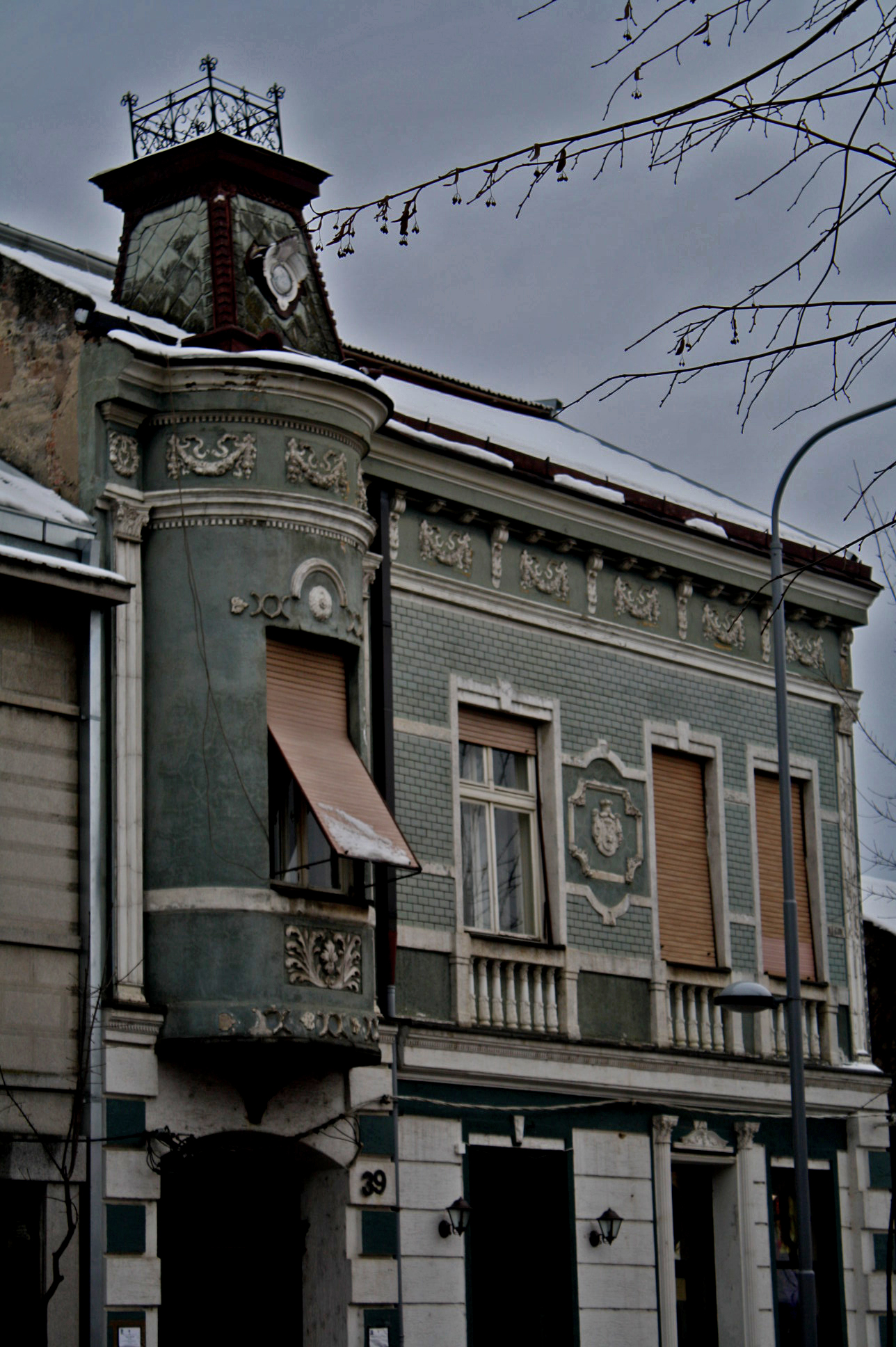 Кућа Драгомира Петровића у Масариковој улици, Шабац.